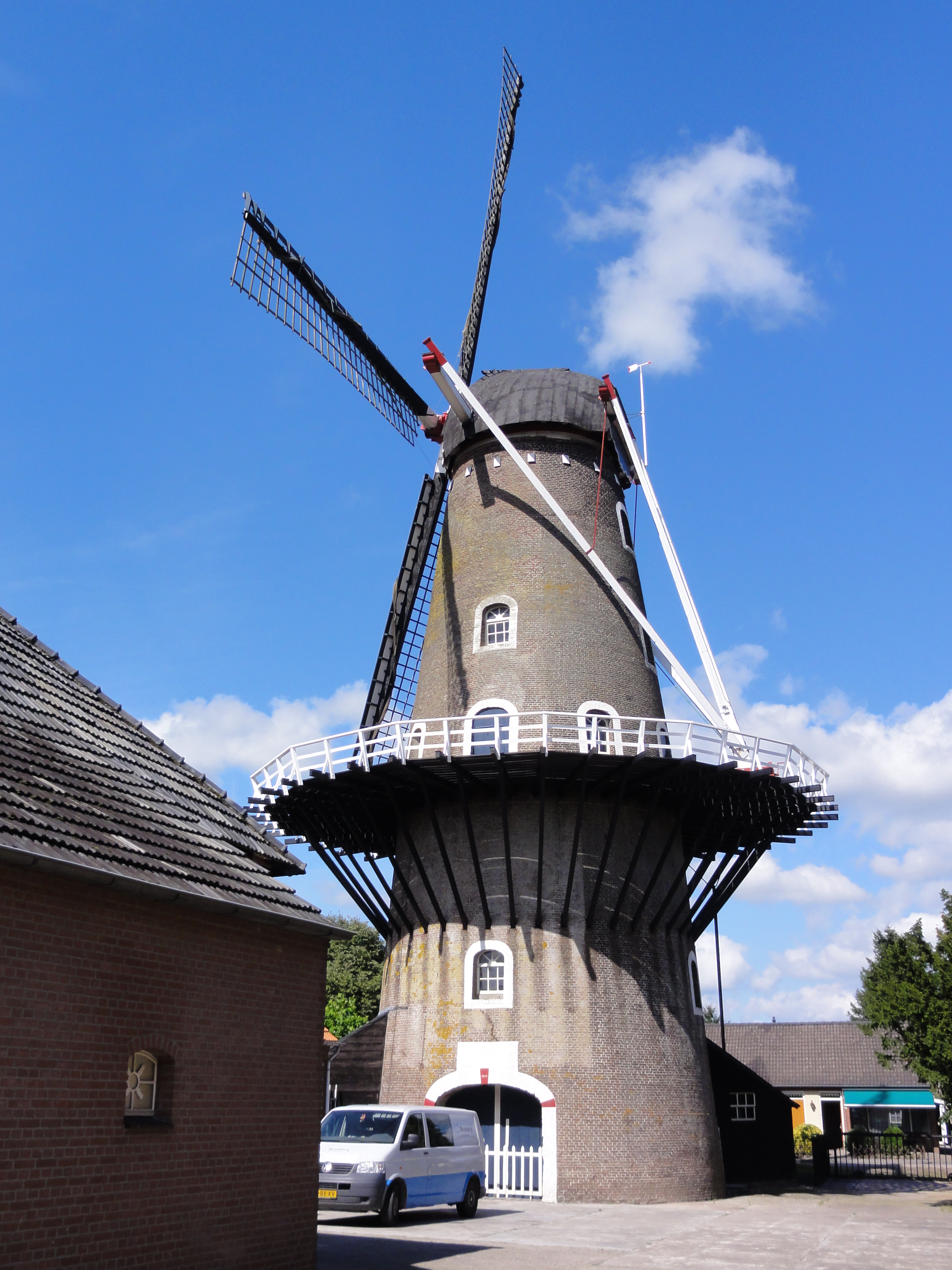 Beneden-Leeuwen molen De Wielewaal